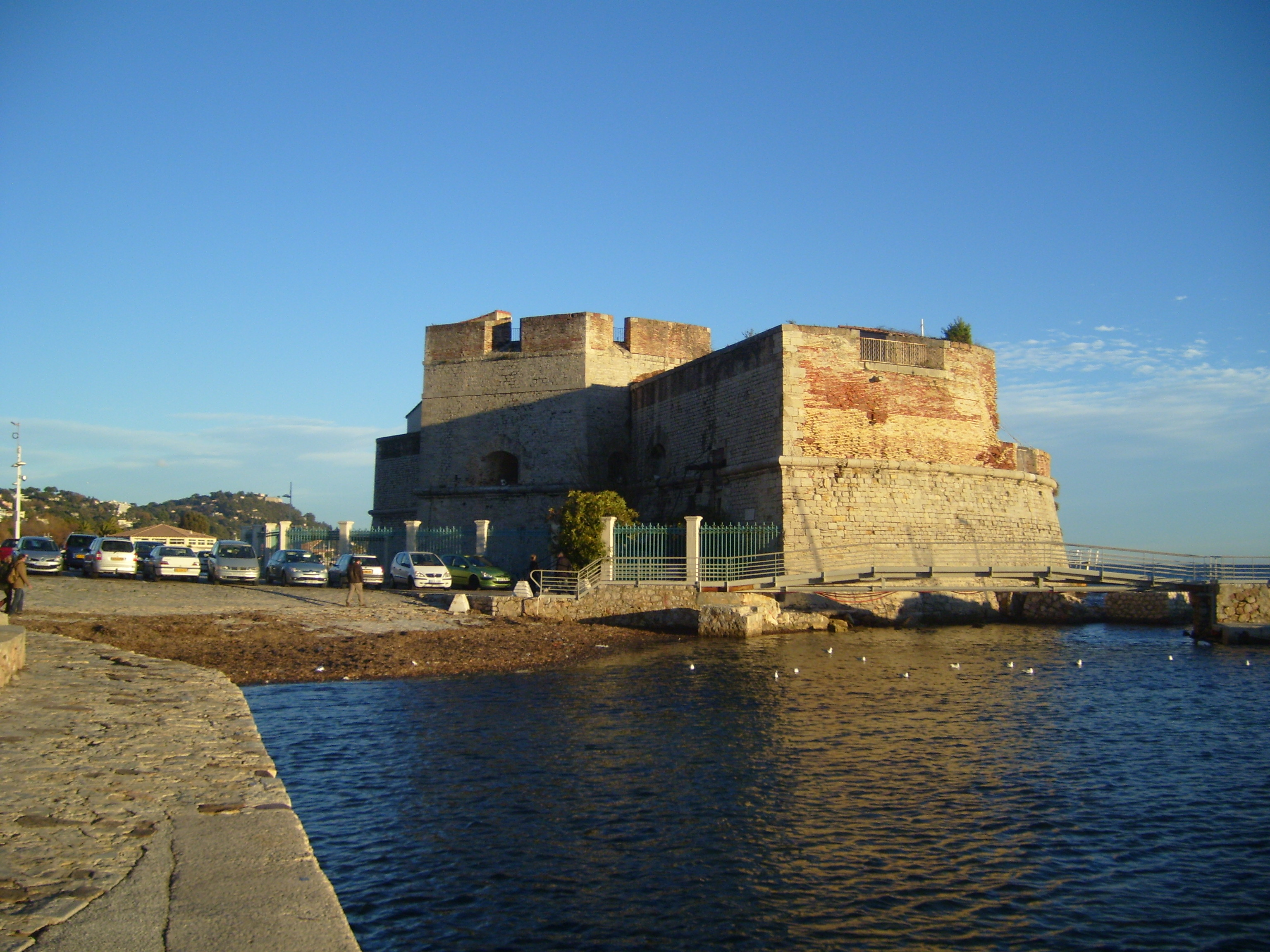 Fort St. Louis, Toulon, France